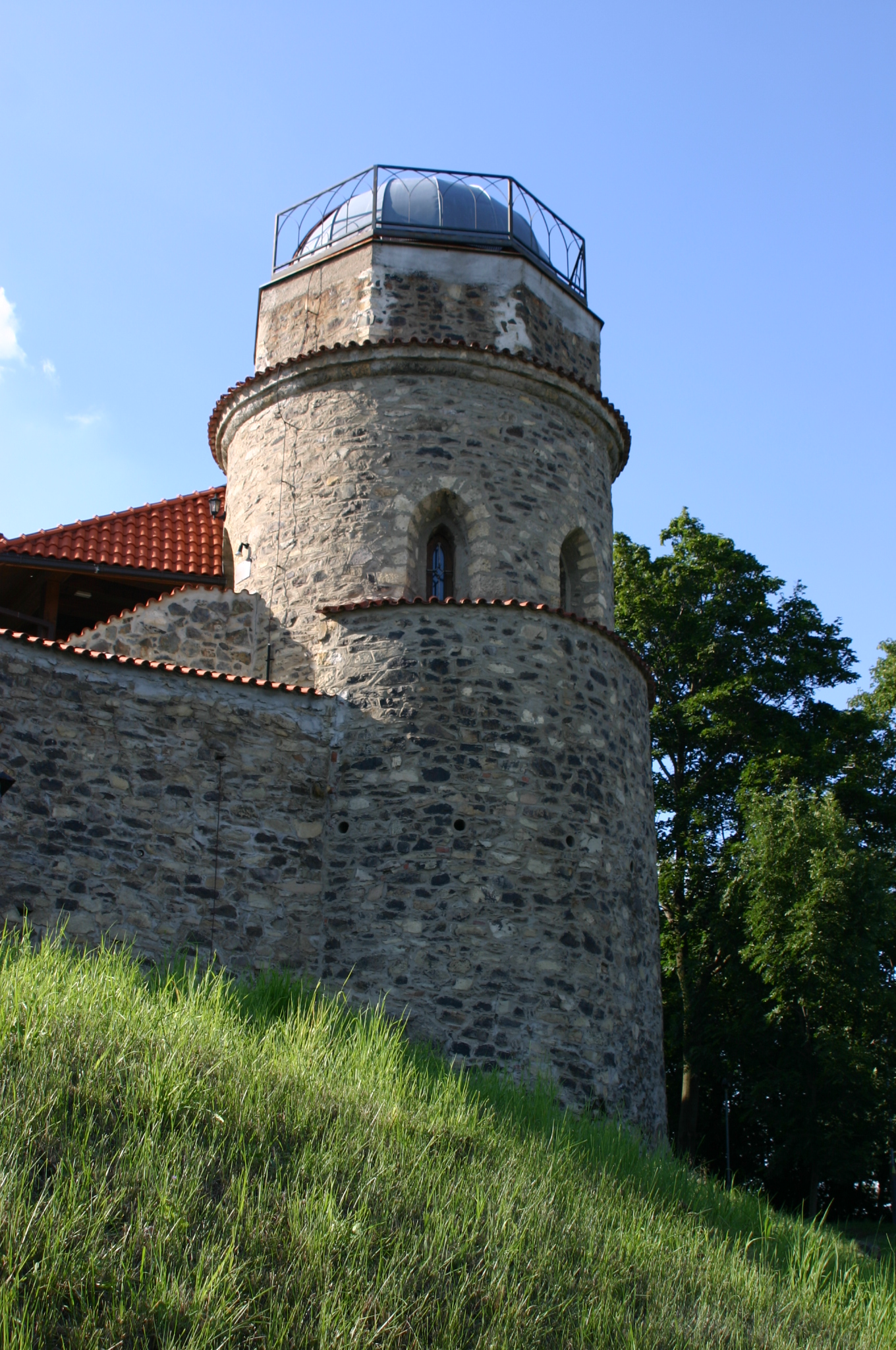 Mostecká hvězdárna na Hněvíně.